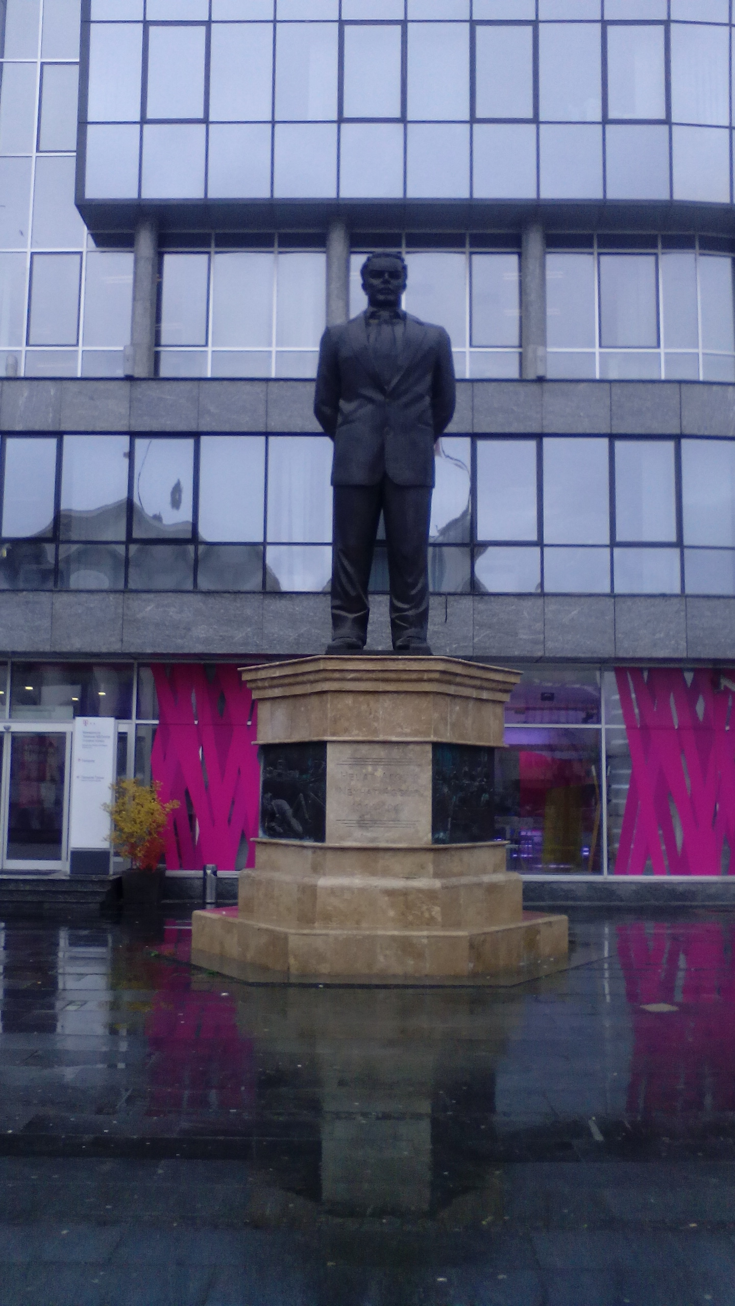 Споменик на Неџат Аголи во Скопје